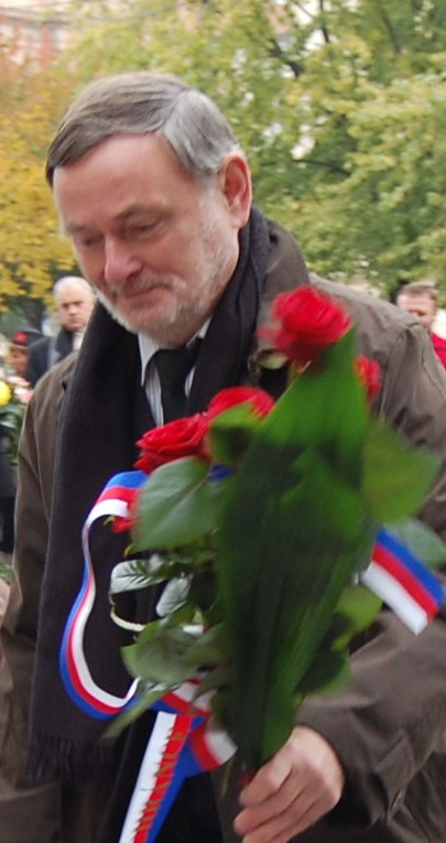 Pavel Varvařovský (2011)